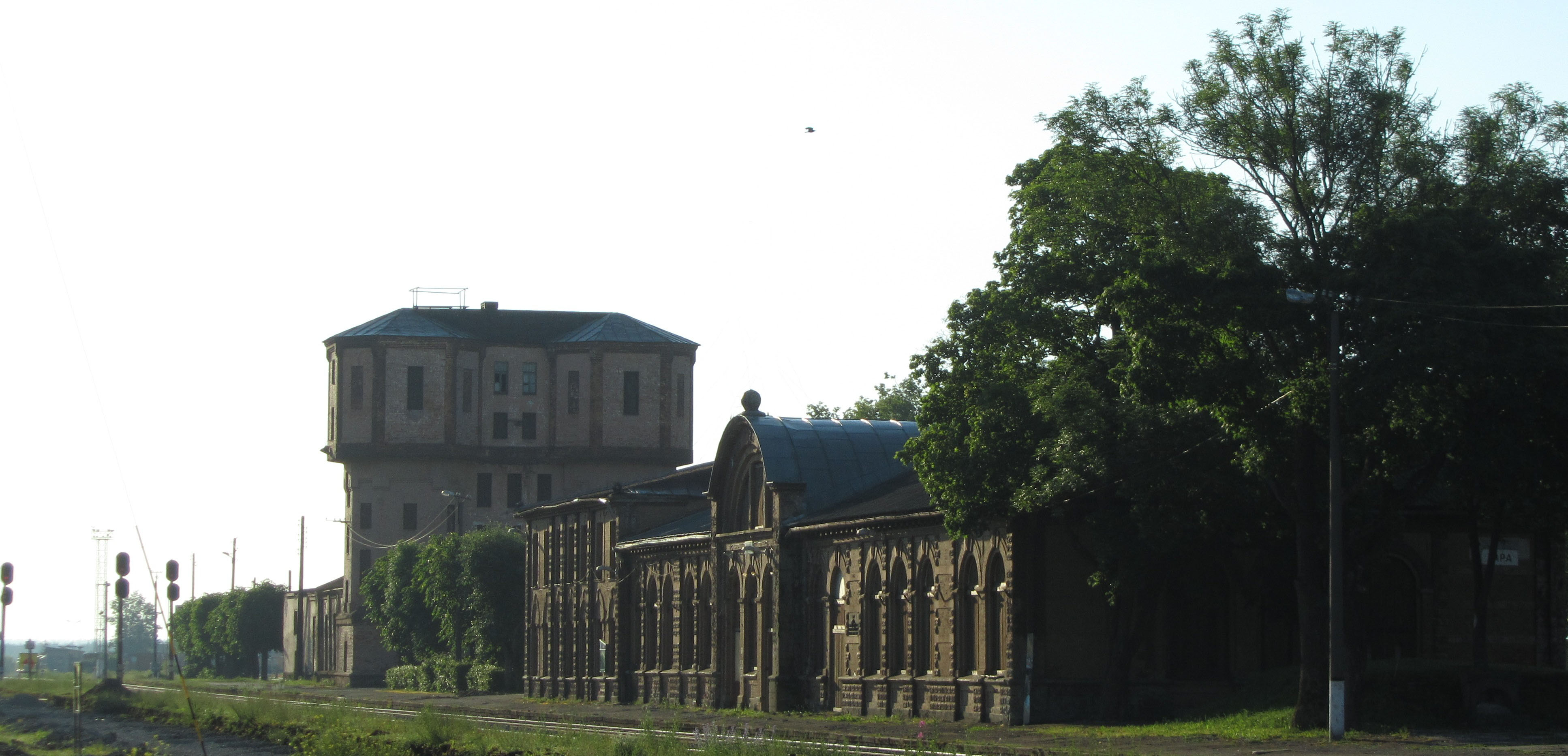 Вокзал Тапа, 2000 год